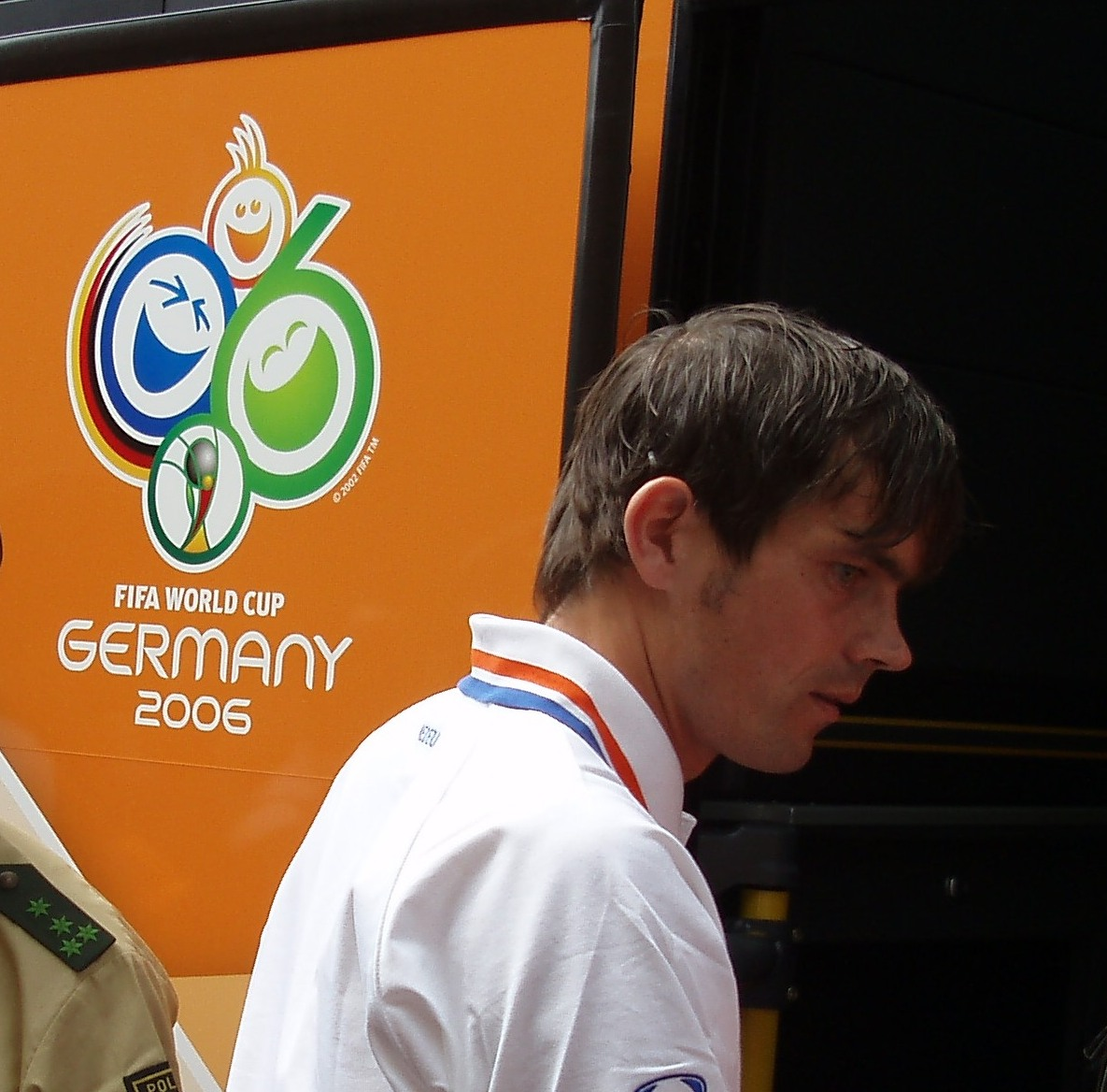 Phillip Cocu, Spieler der niederländischen Fußballnationalmannschaft